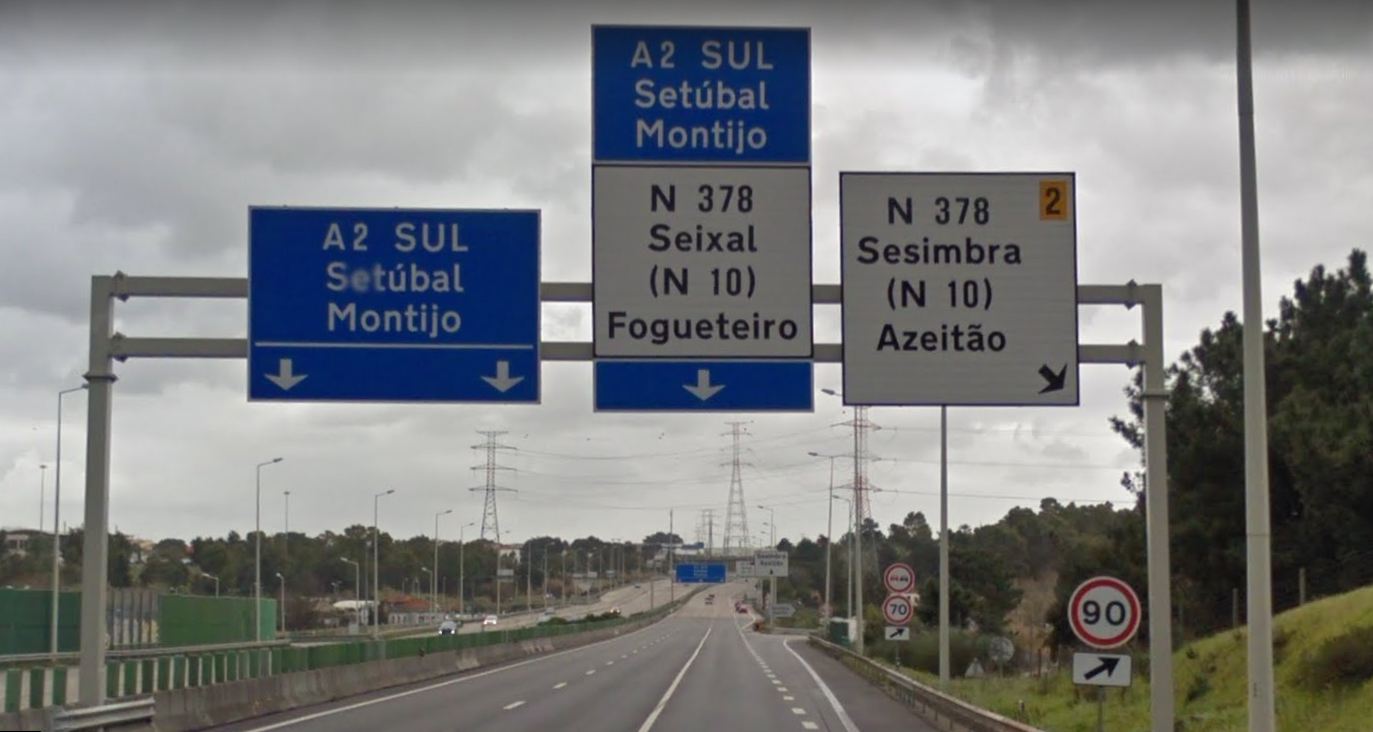 Nó do Fogueteiro da A2, tirado em fevereiro de 2015.